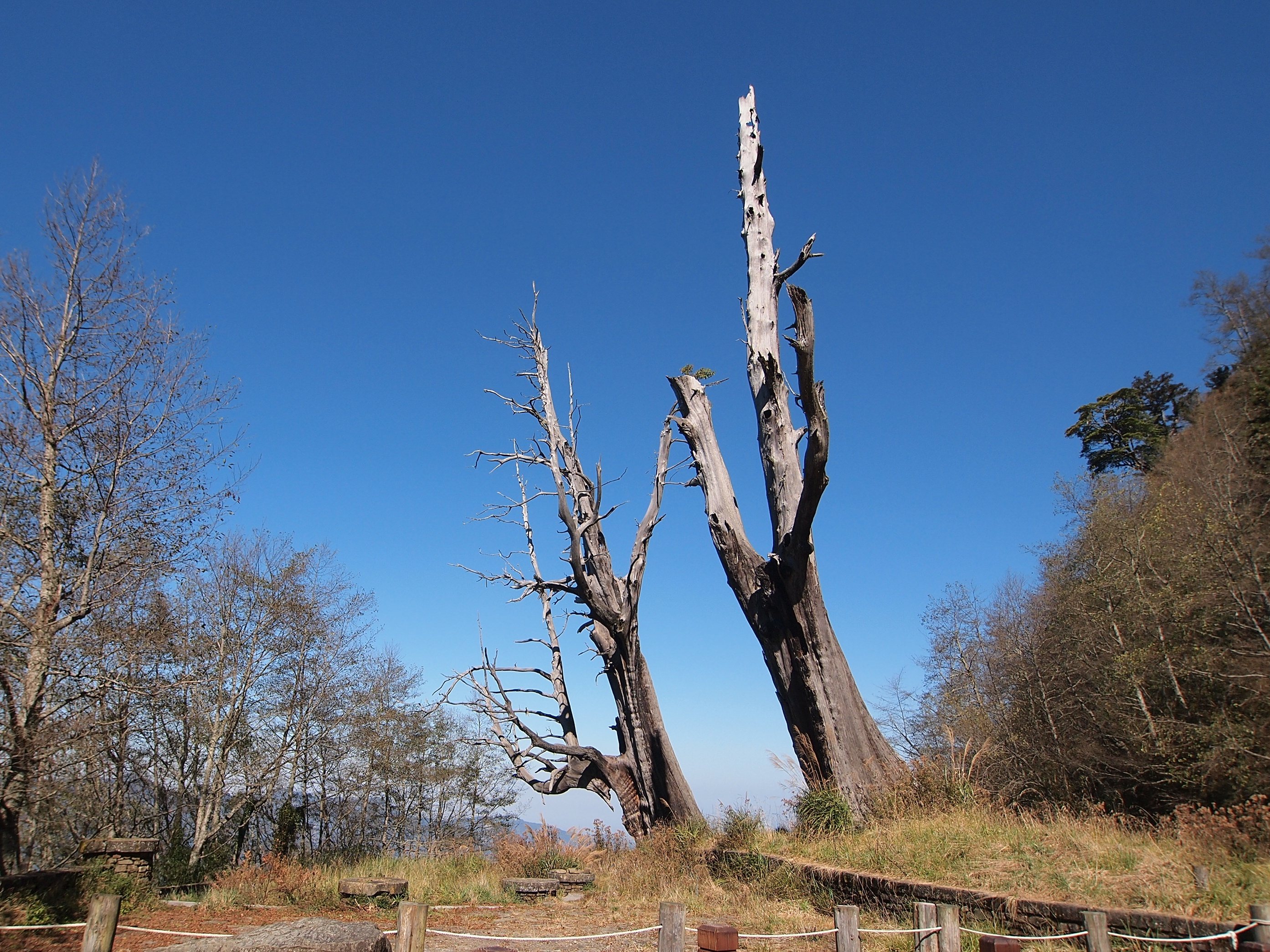 塔塔加夫妻神木 - Tataka Couple Trees - 2012.02